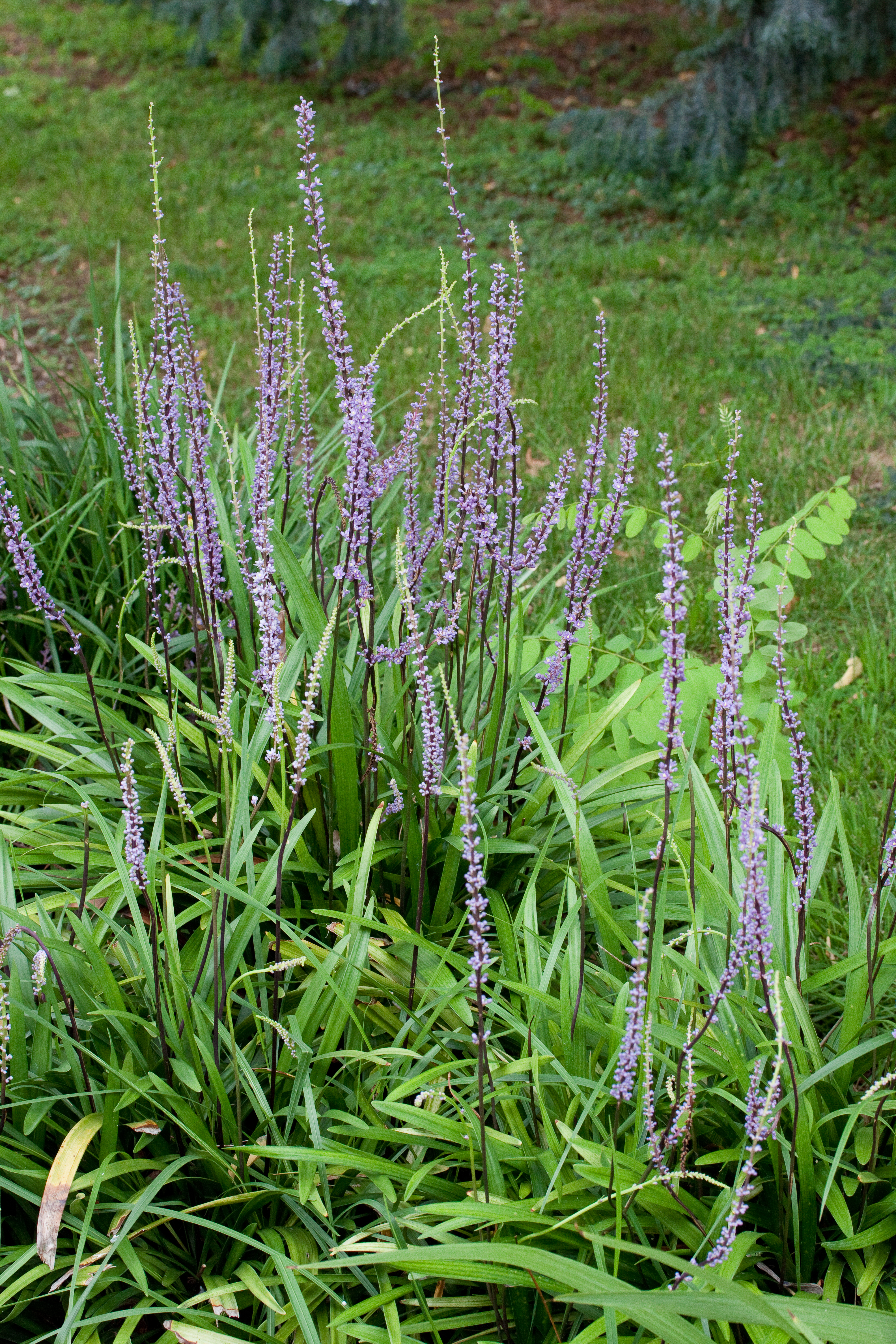 Floraison de Liriope muscari - Jardin des Plantes - Paris - France